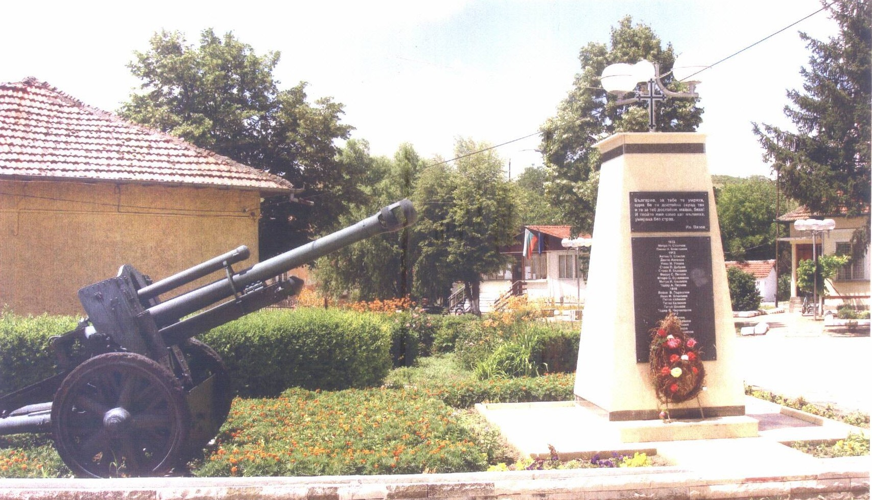 Паметник на загиналите жители на с.Шияково